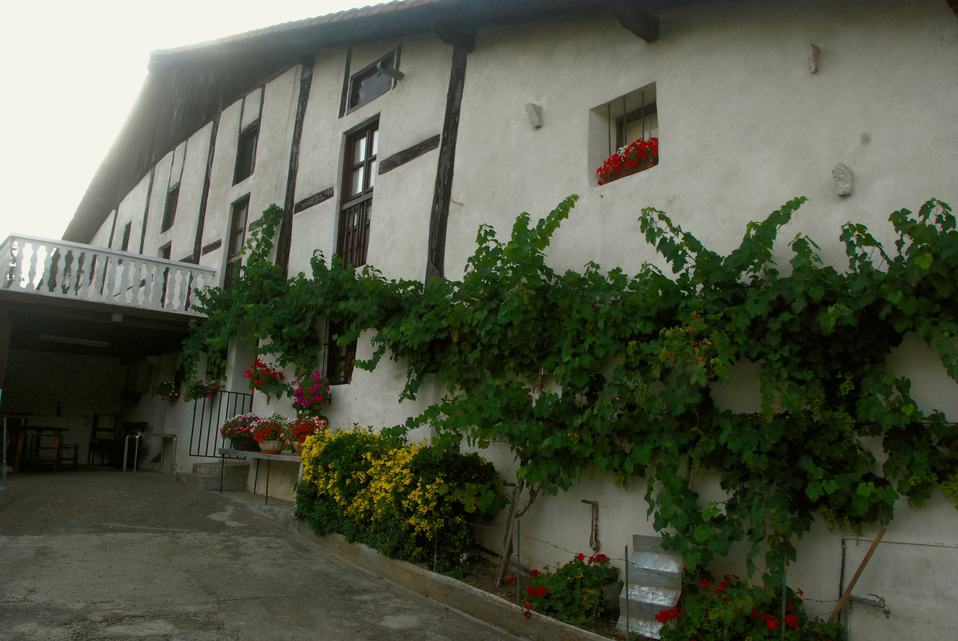 Zuaznabar Haundi baserria. Aurrealdea.